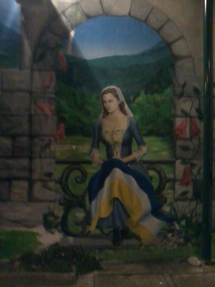 Javiera Carrera elaborando la primera bandera nacional de Chile, durante la Patria Vieja.